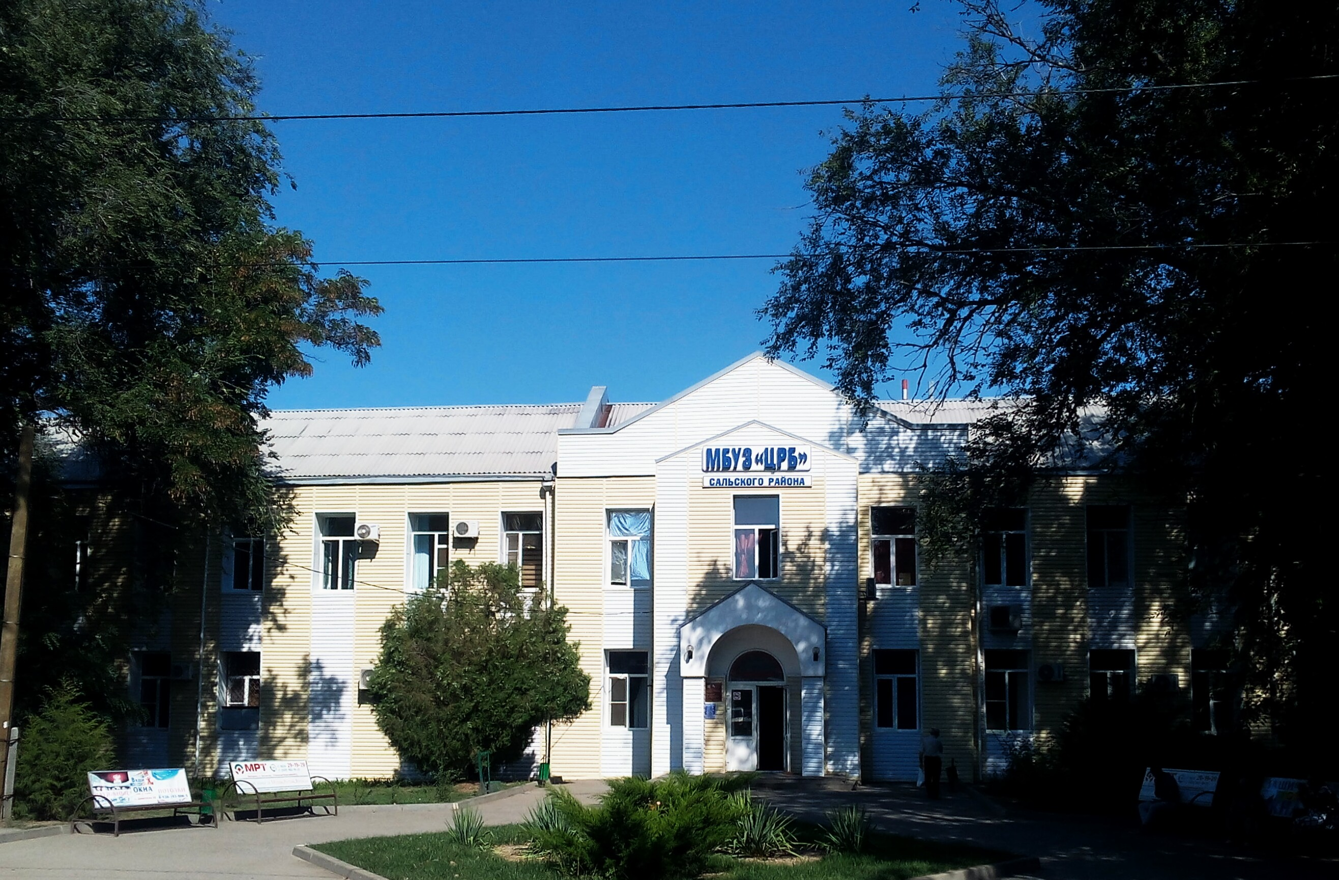 г.Сальск, Павлова ул., здание Центральной больницы